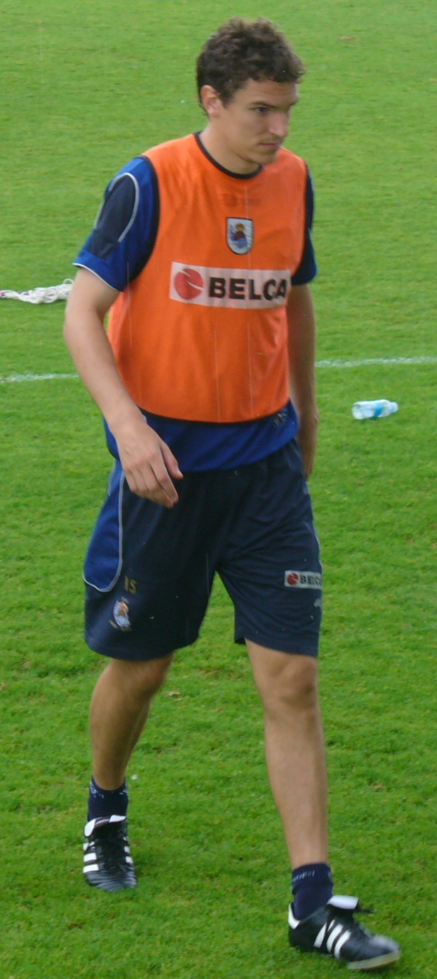 Ion Ansotegi en Zubieta